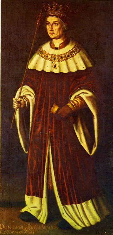 Retrato imaginario del rey Juan II de Aragón (1398-1479).